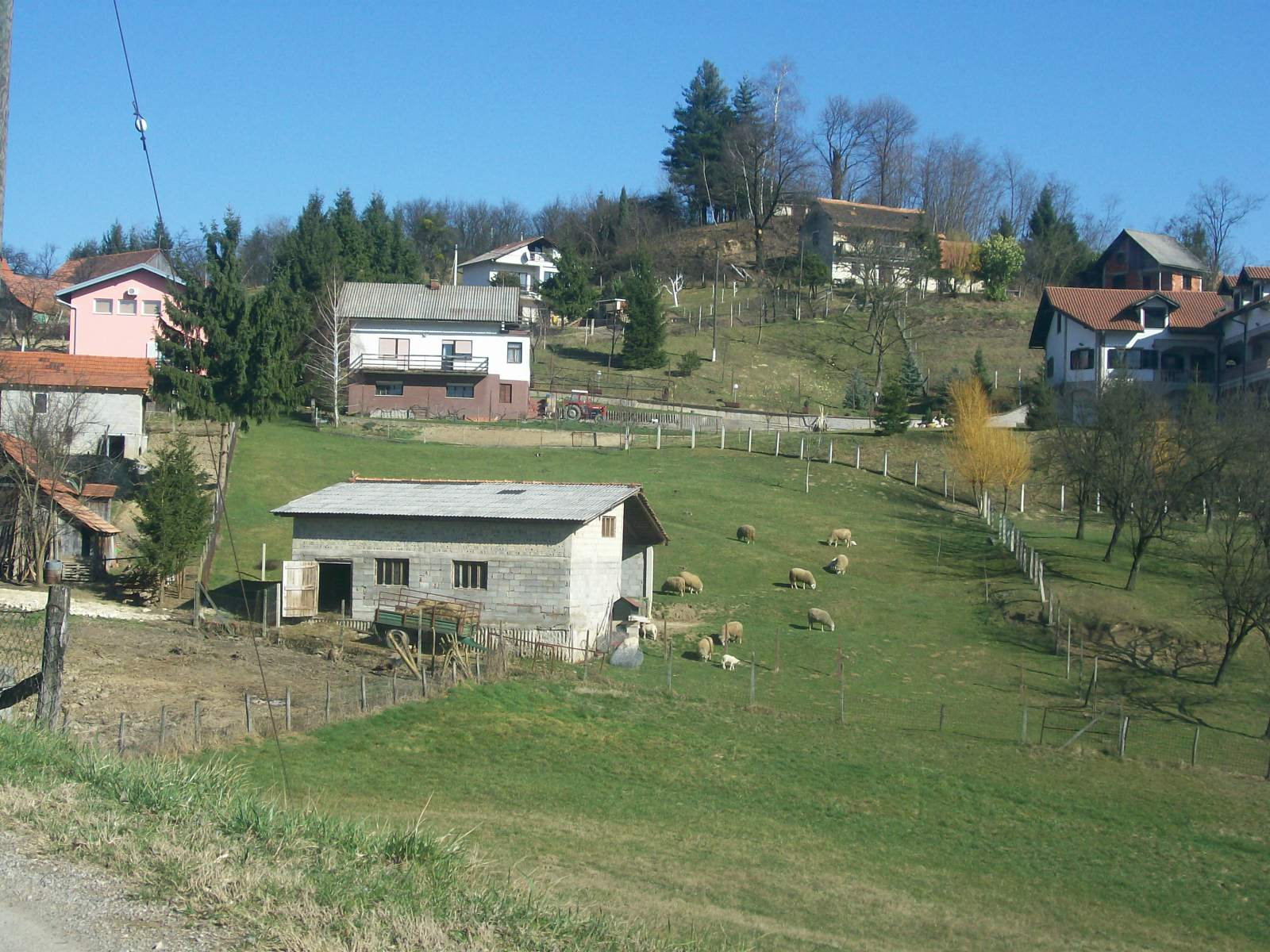 Ovce u Celinama Goričkim, općina Marija Gorica (Zagrebačka županija)